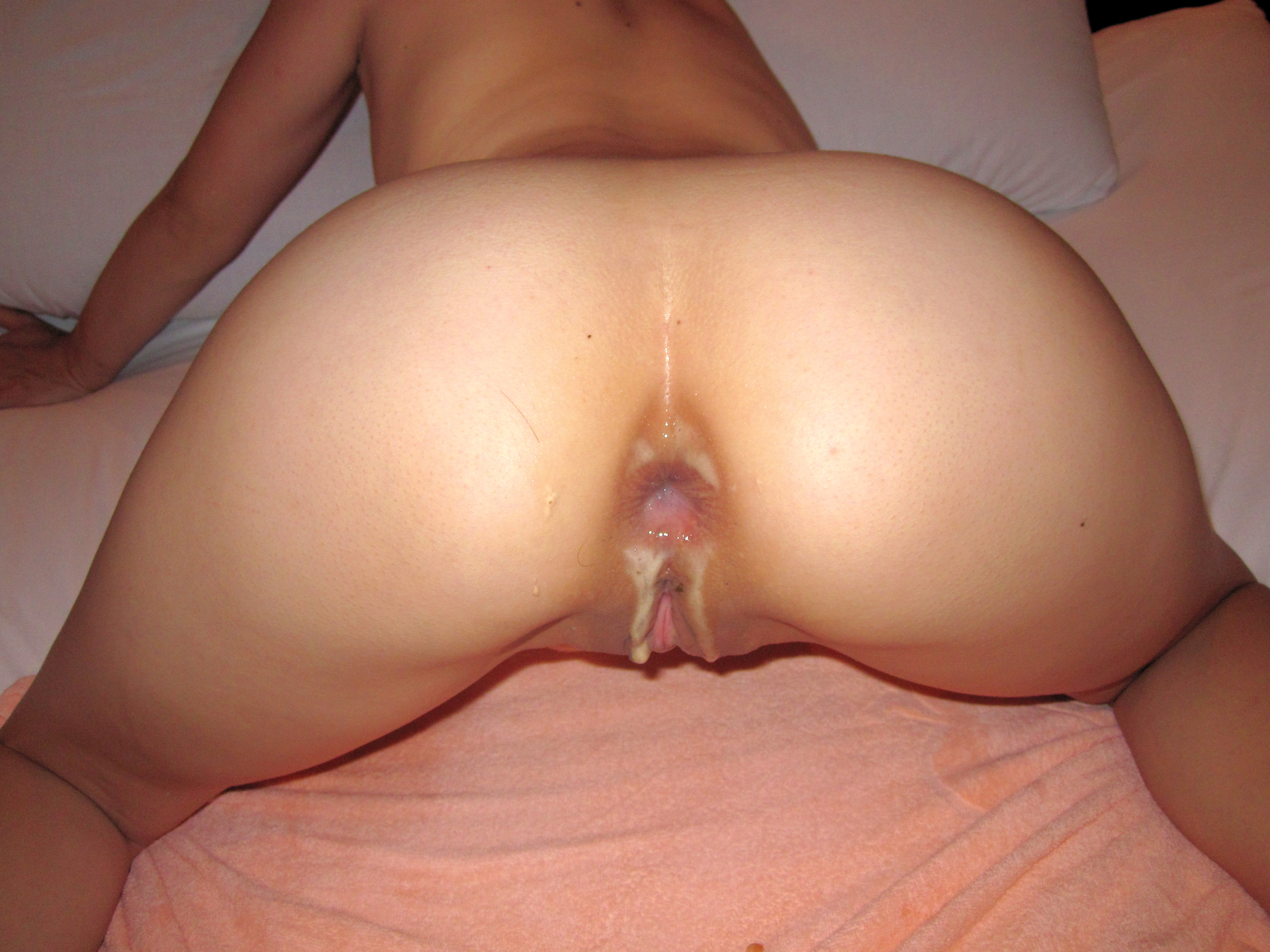 肛内射精後のアナル